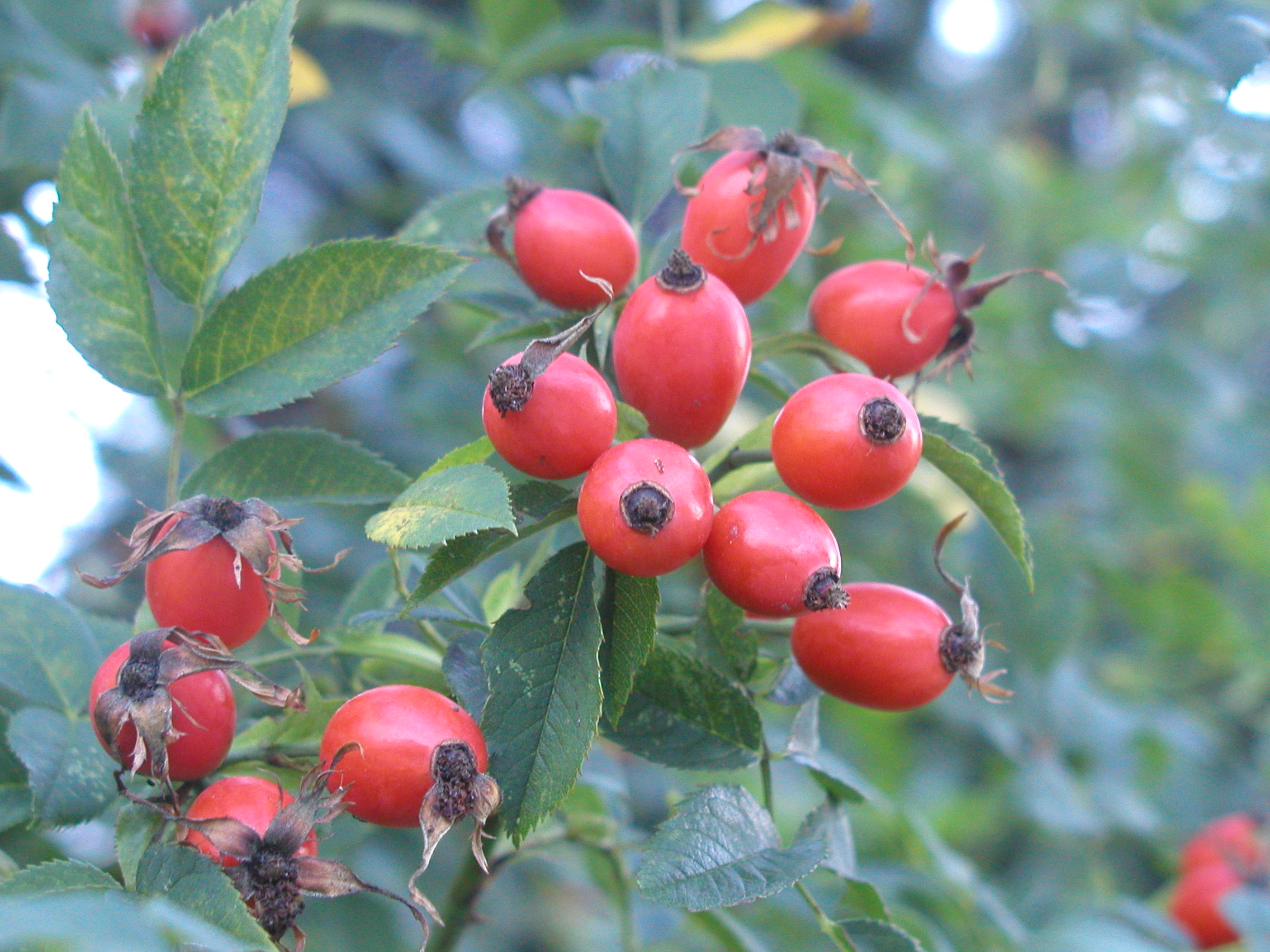 rosa canina dzika róża - owoce